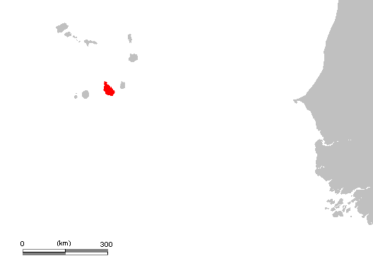 CV Sao Tiago.PNG (Cape Verde)